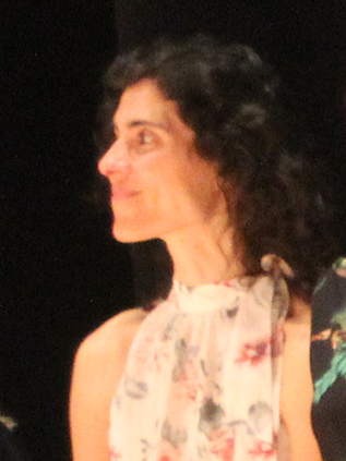 Ana Bautista, invitada a la Gala 20º Aniversario de la Medalla de Oro de Atlanta '96 en Badajoz (2016).